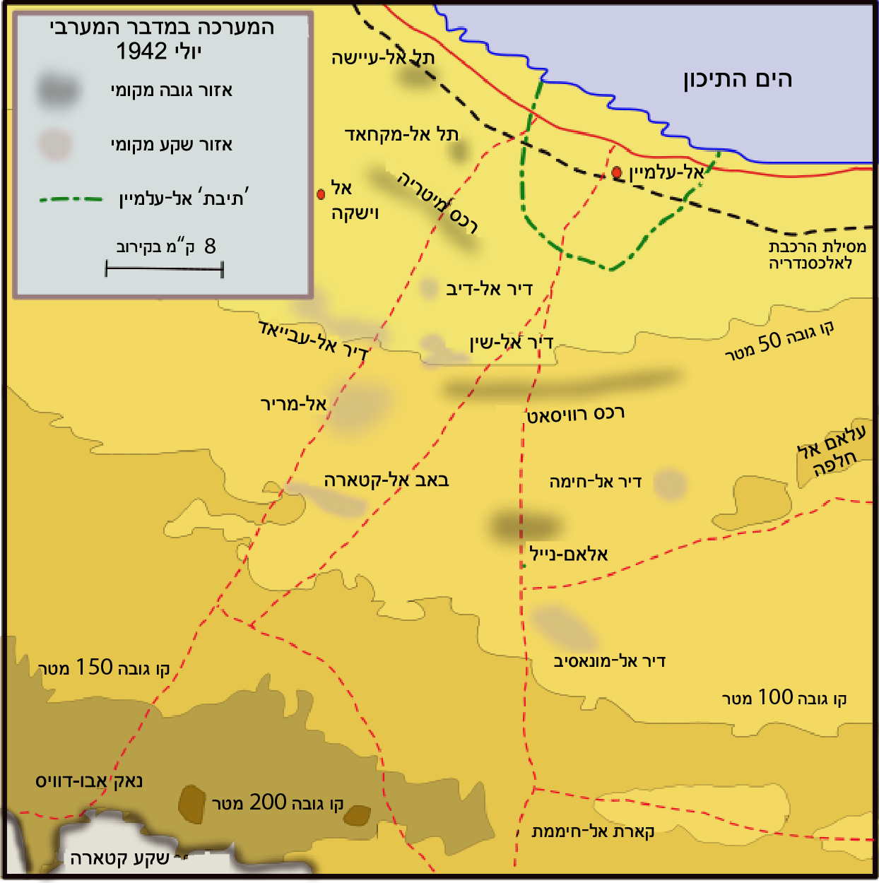 המערכה במדבר המערבי, יולי 1942.